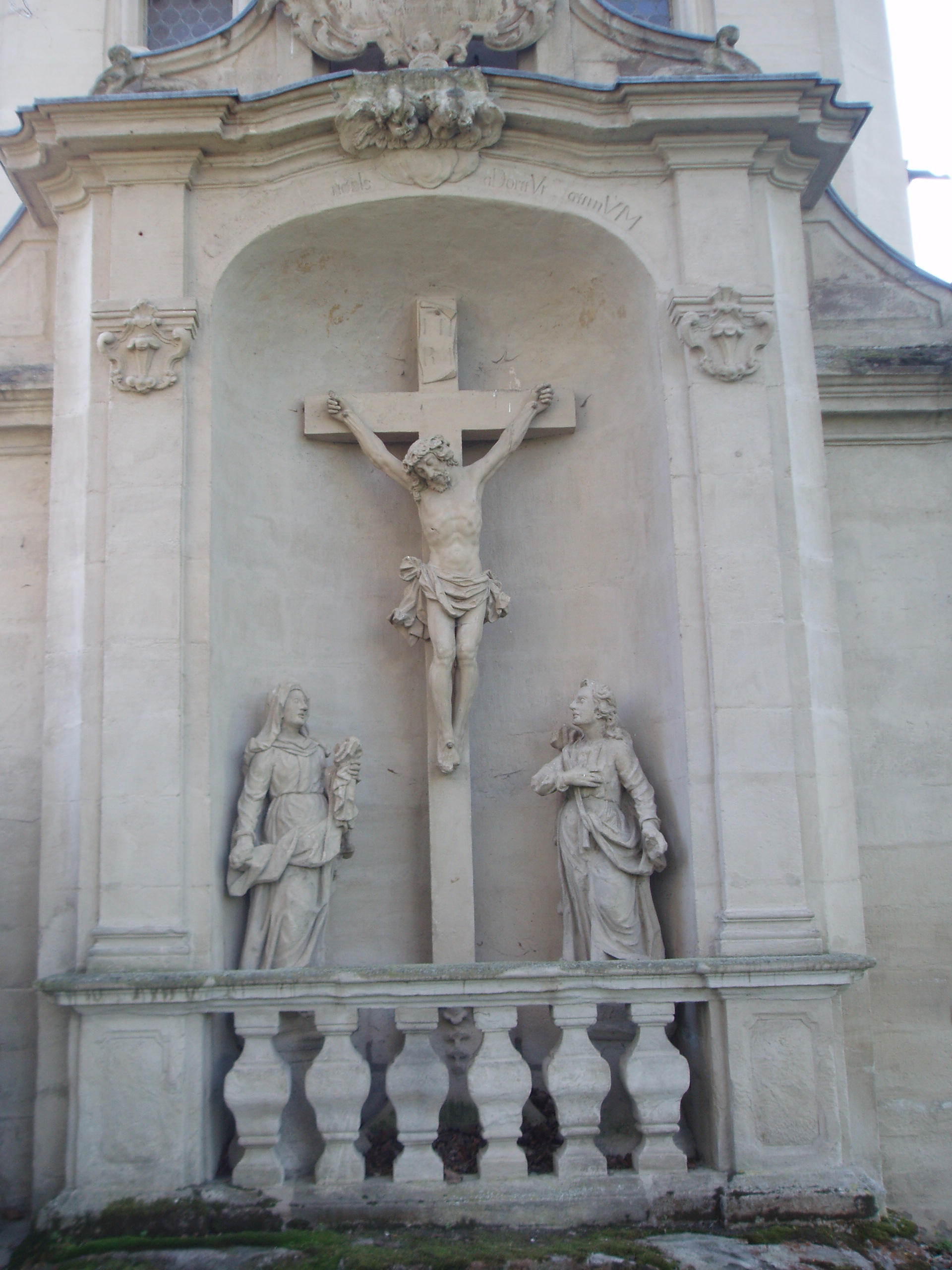 Ellingen, Maxkirche, Kreuzigungsgruppe im Osten der Kirche